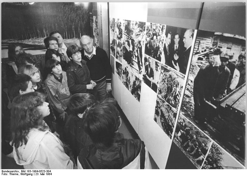 Sosa, Jugendstunde im Museum der Talsperre Zum Beitrag. Im Höllengrund machte die Jugend Geschichte. Sosaer Talsperrenbauer erinnern sich. ADN-ZB Thieme-23.5.84-bb. Schüler der Klasse 8a der Hans-Marchwitza-Oberschule Hoyerswerda erleben eine Jugendstunde in der Traditionsstätte Talsperre des Friedens Sosa im Erzgebirge. Eindrucksvoll berichtet ihnen Arbeiterveteran Walter Arend vom Elan der jungen Erbauer der Talsperre, die das Bauwerk in den Jahren 1949-1951 errichteten. Das kleine Museum in unmittelbarer Nachbarschaft des Stausees hat jährlich mehr als 10.000 Besucher (hierzu gehören die Fotos 1984-0523-303N, 304N sowie S88466 und Z0608-1)